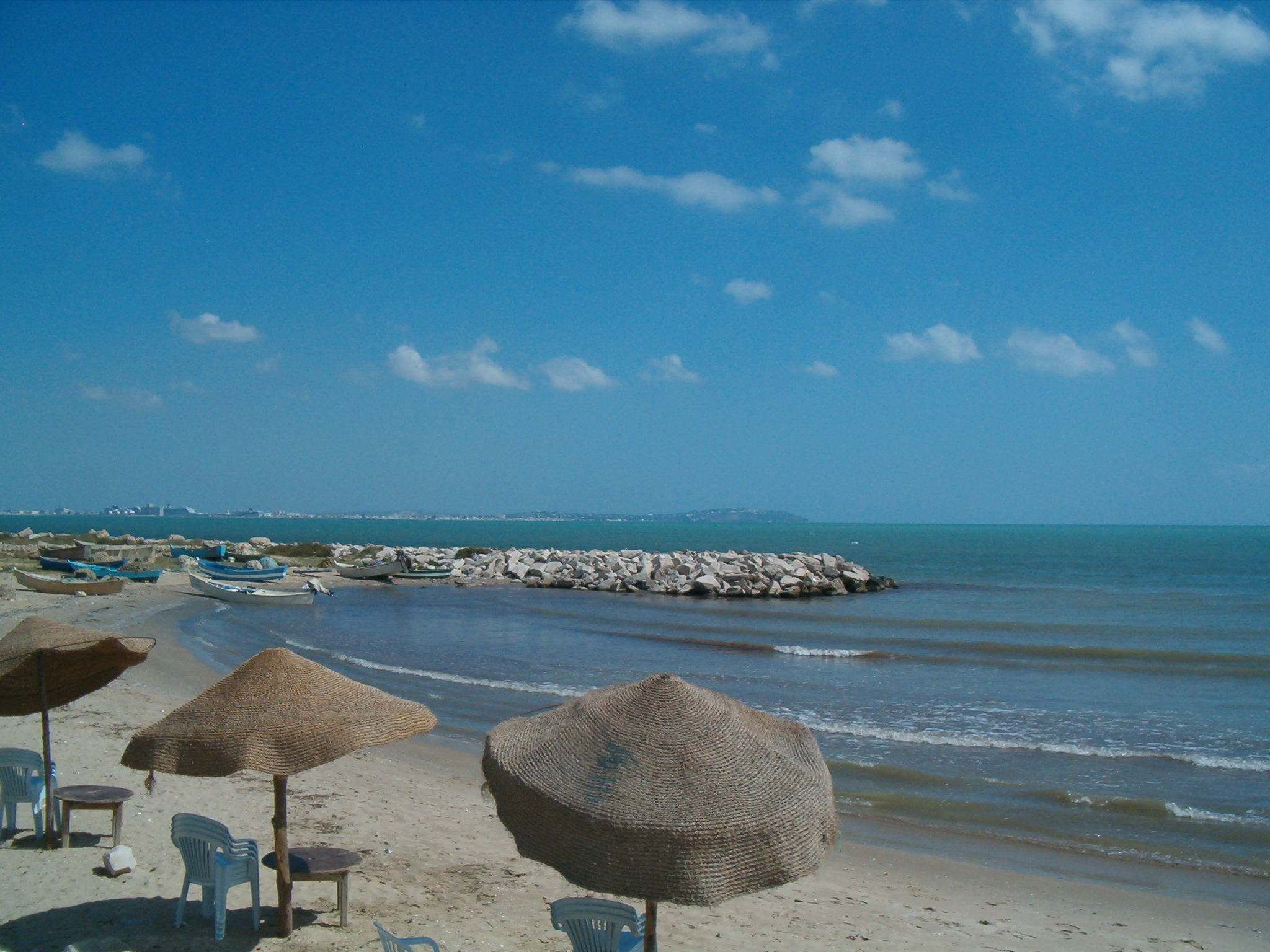 hammam chatt tunisie